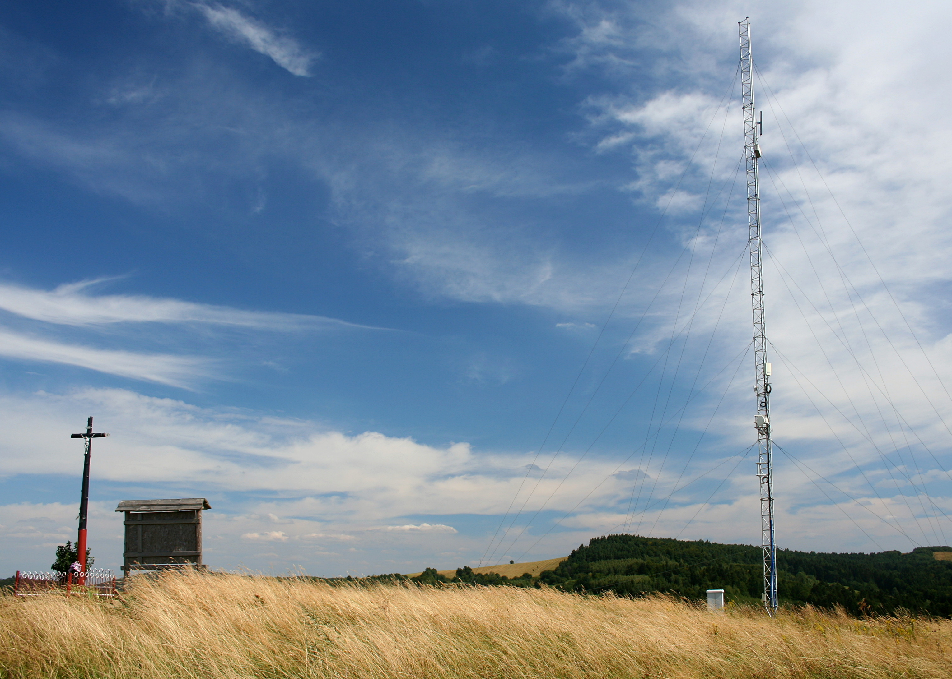 Maszt na Żabiej Górze w Lubatowej